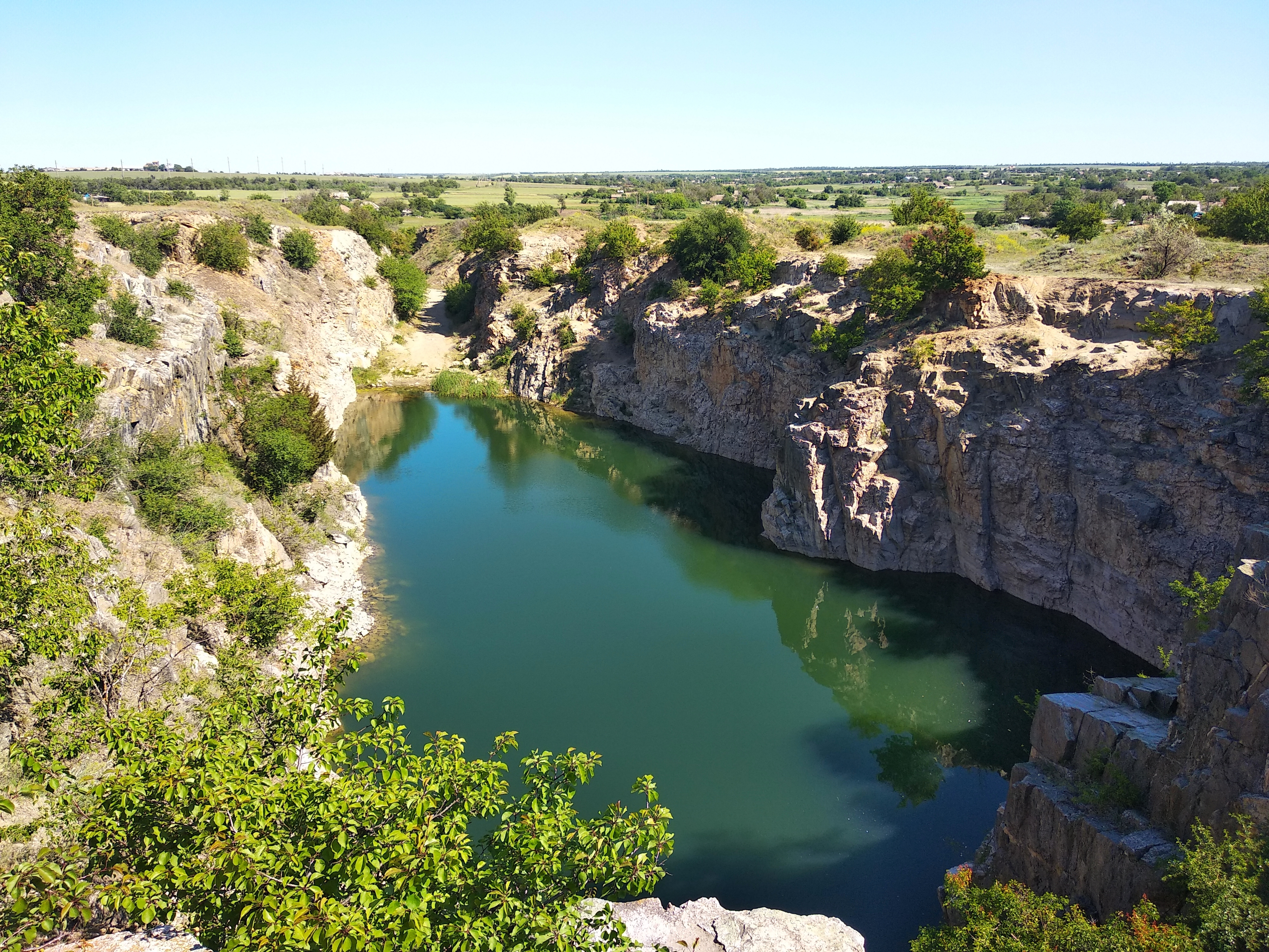 «Єлисєйський пігматітовий кар'єр», Приморський р-н, с. Єлісєївка